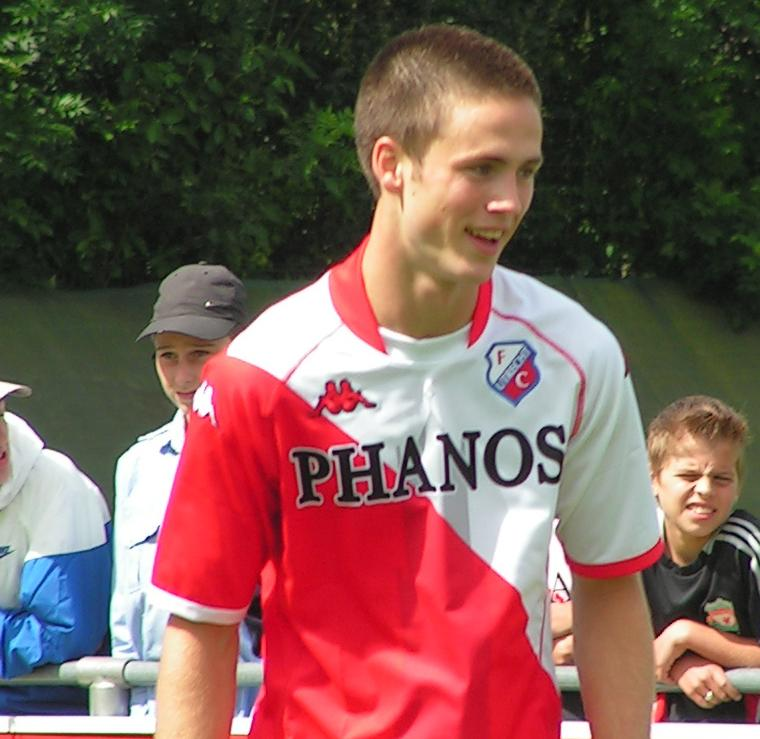 Nederlands voetballer Ricky van Wolfswinkel in het tenue van FC Utrecht